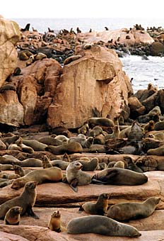 Lobos de dos pelos (finos) en la Isla de Lobos